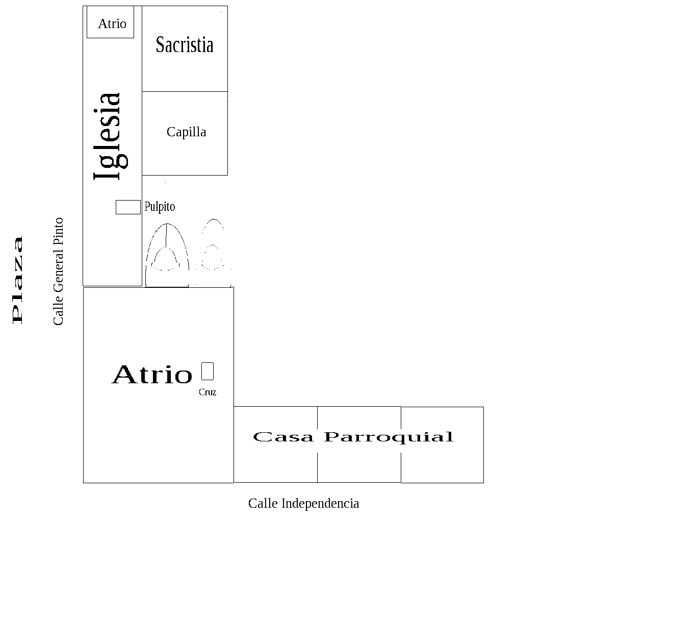 Plano de la primitiva iglesia, reproducción de los planos originales